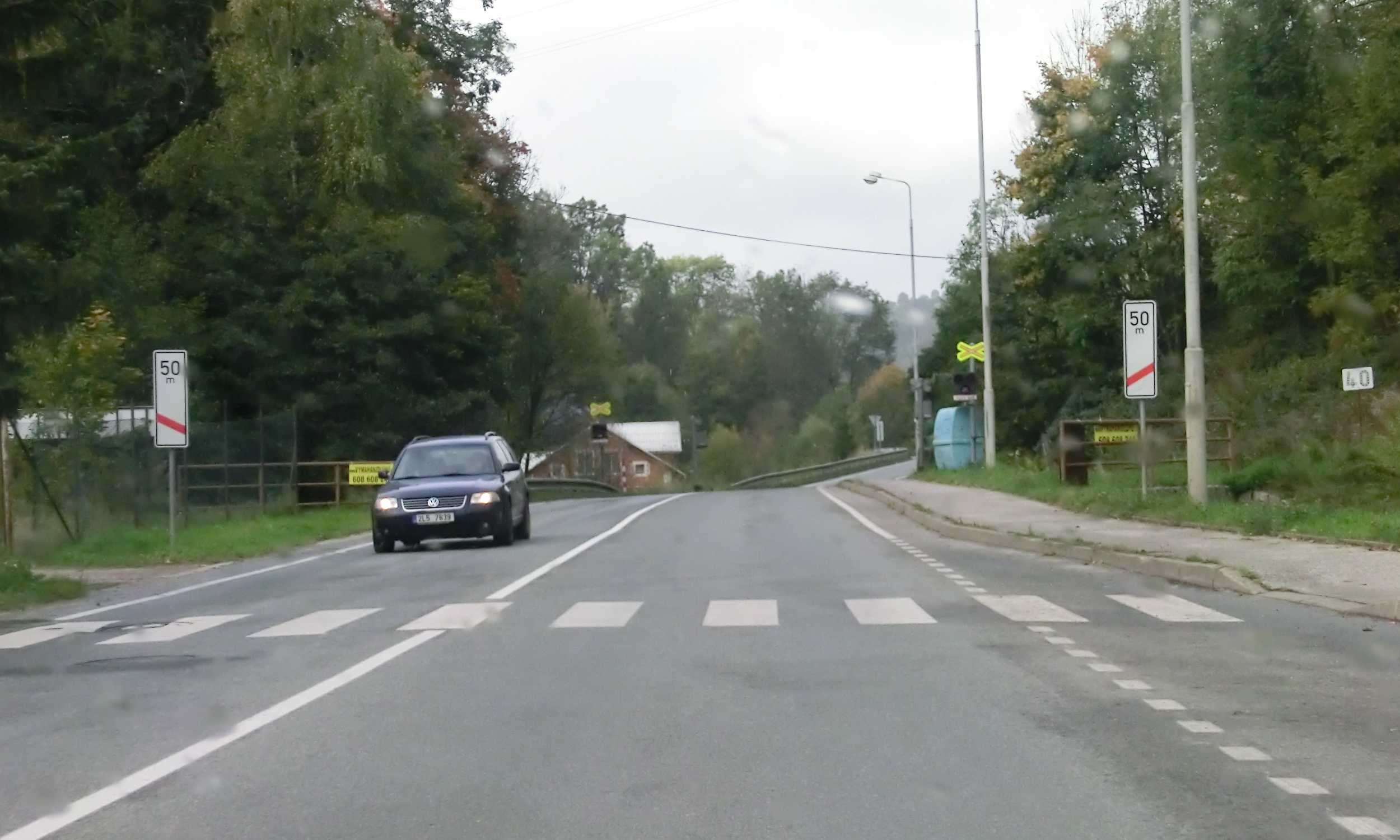 Silnice II/286 křižuje potok Jilemku a vzápětí železniční trať 042 (Martinice v Krkonoších - Rokytnice nad Jizerou), za vcelku zbytečně navršeným kopečkem začíná klesání do Hrabačova.